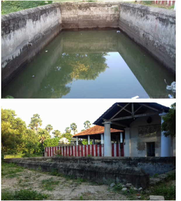 அராலி ஸ்ரீ விசாலாக்ஷி சமேத விஸ்வநாதேஸ்வரர் தேவஸ்தானம்